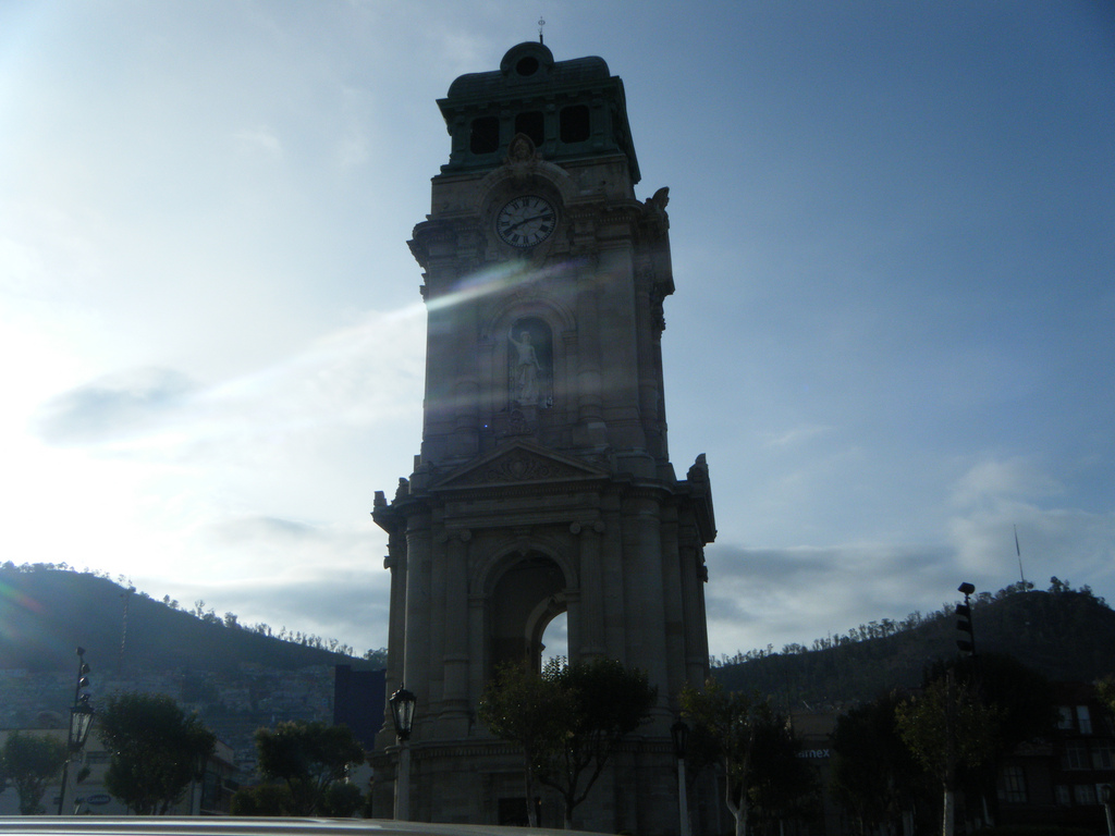 Reloj monumental de Pachuca de Soto, México